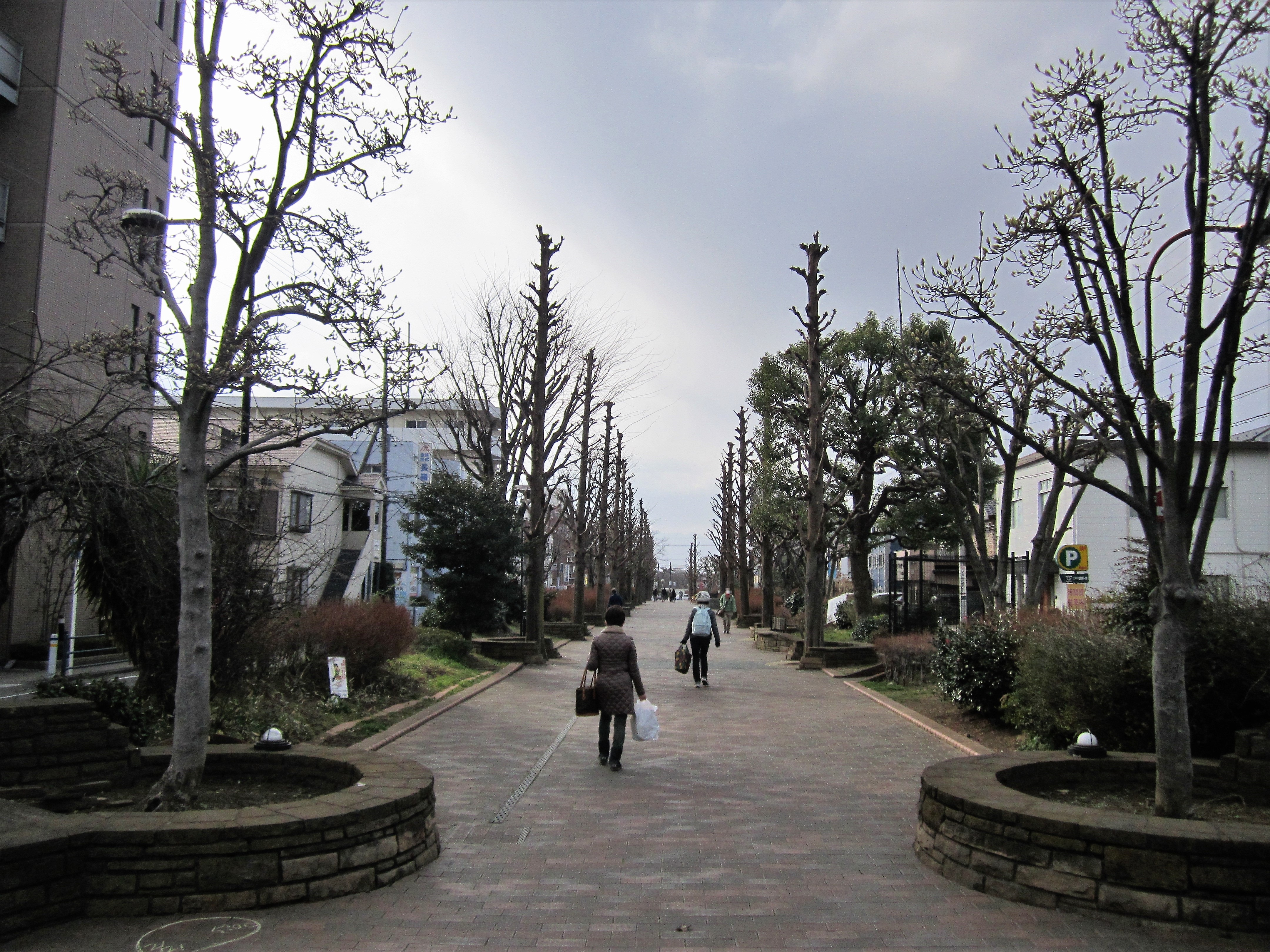 なでしこの道（大和駅西口方面の相鉄地上線跡） Canon PowerShot A2200